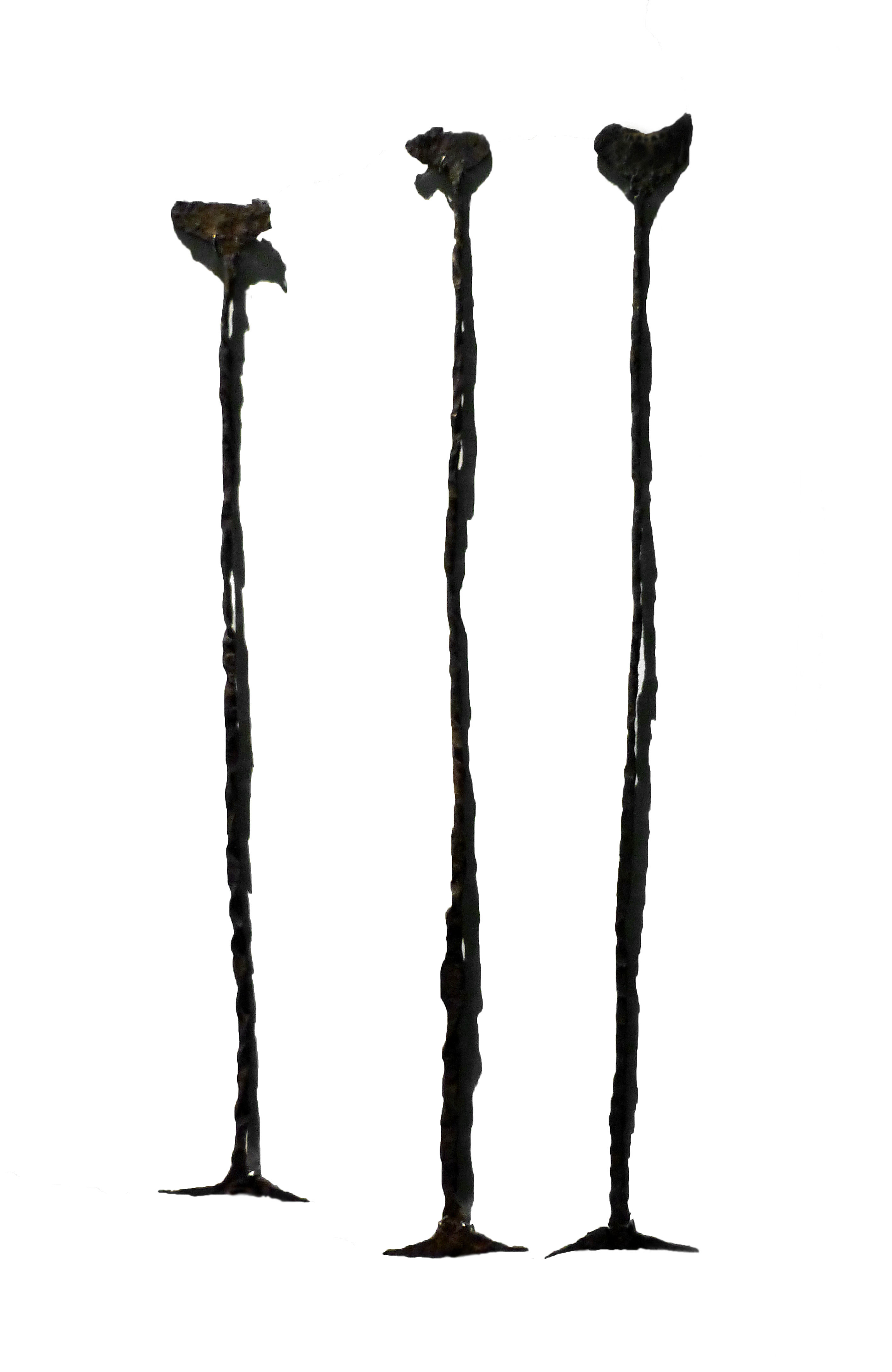 Monnaies guinze des Toma et Kissi. Guinée. Lyon. Musée des Confluences.